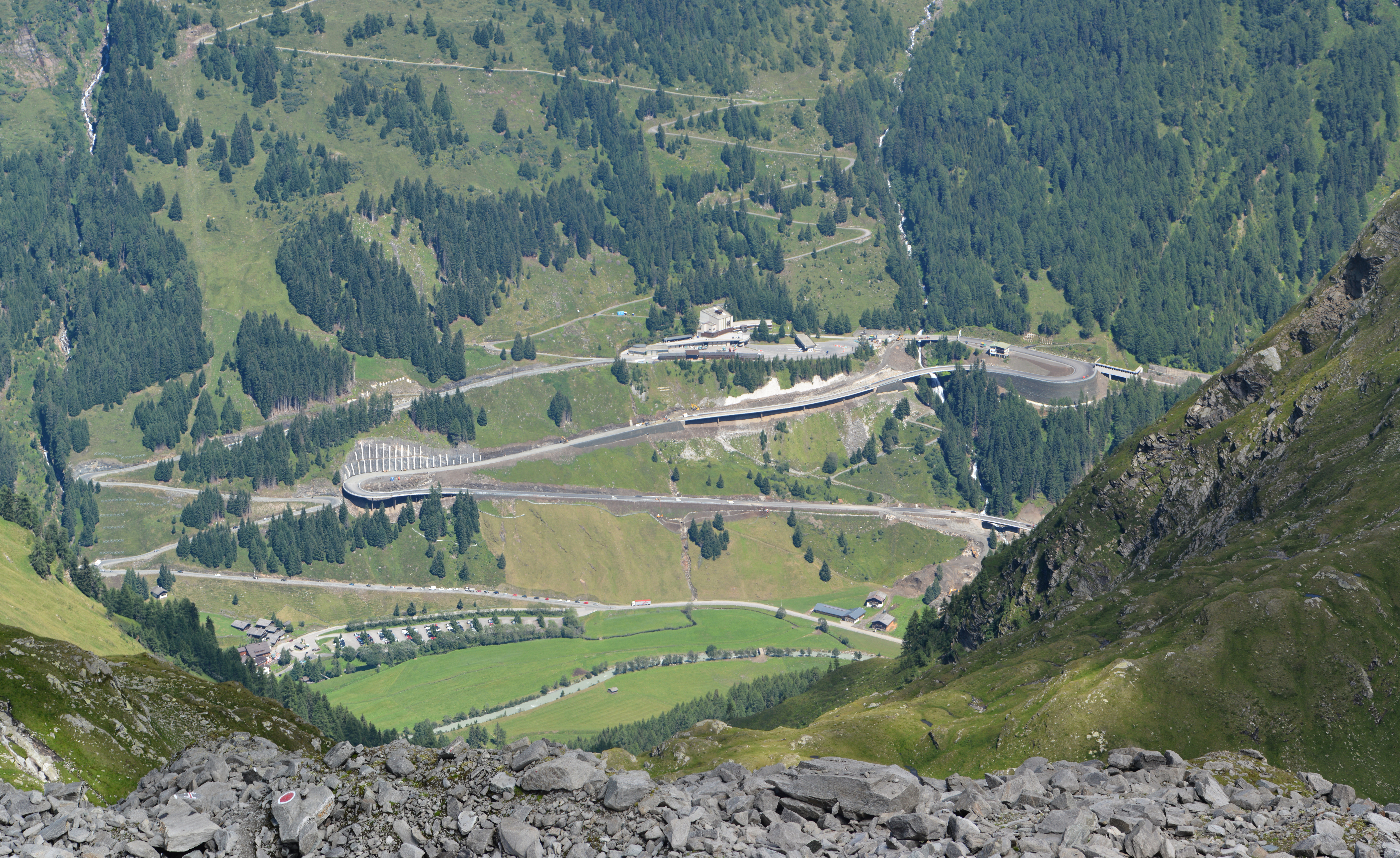 Panorama der Felbertauernstraße mit Felbertauerntunnel (Südportal), gesehen vom Wildenkogelweg.